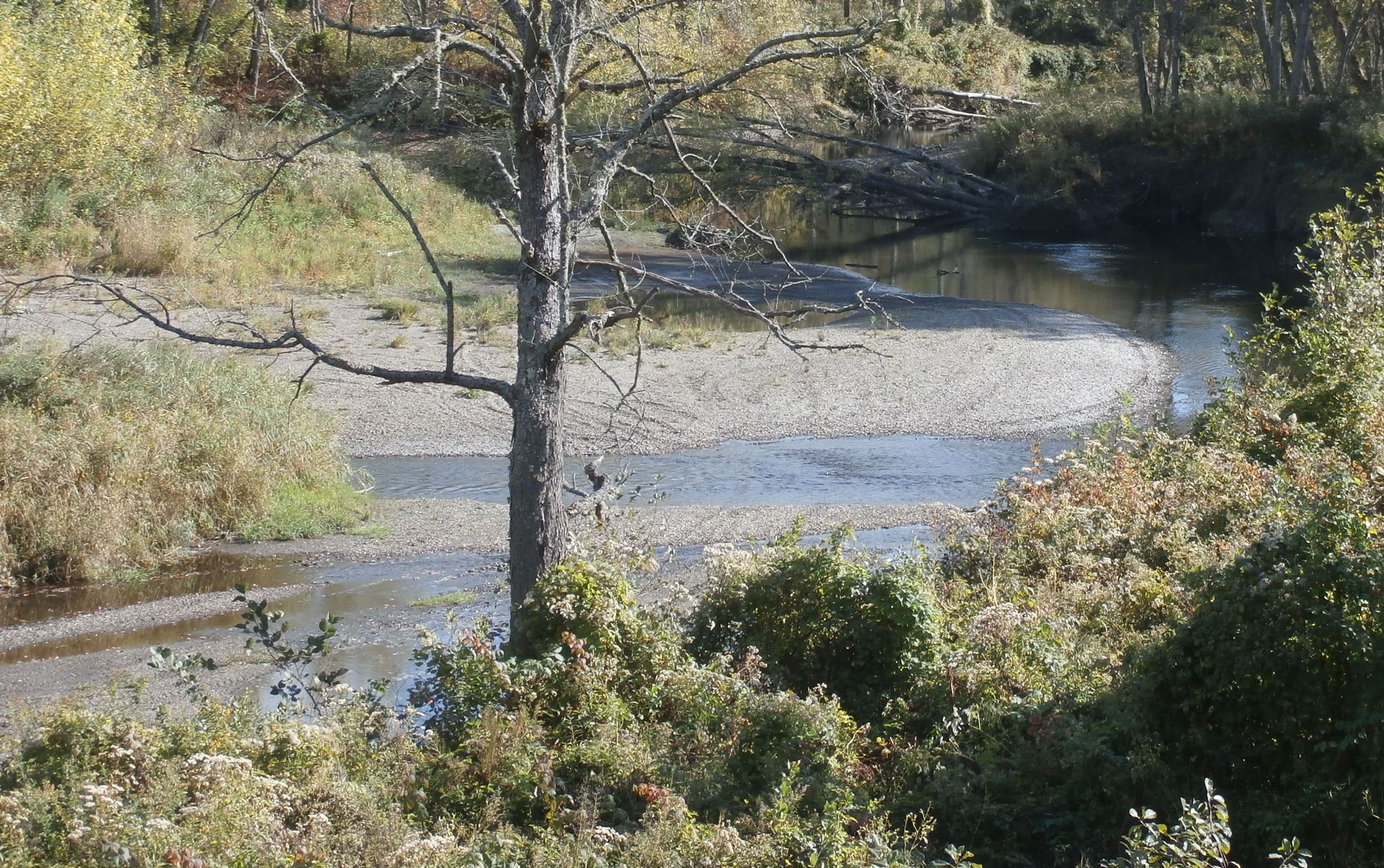 Rivière Hall (Québec-New Hampshire) près de East Hereford.